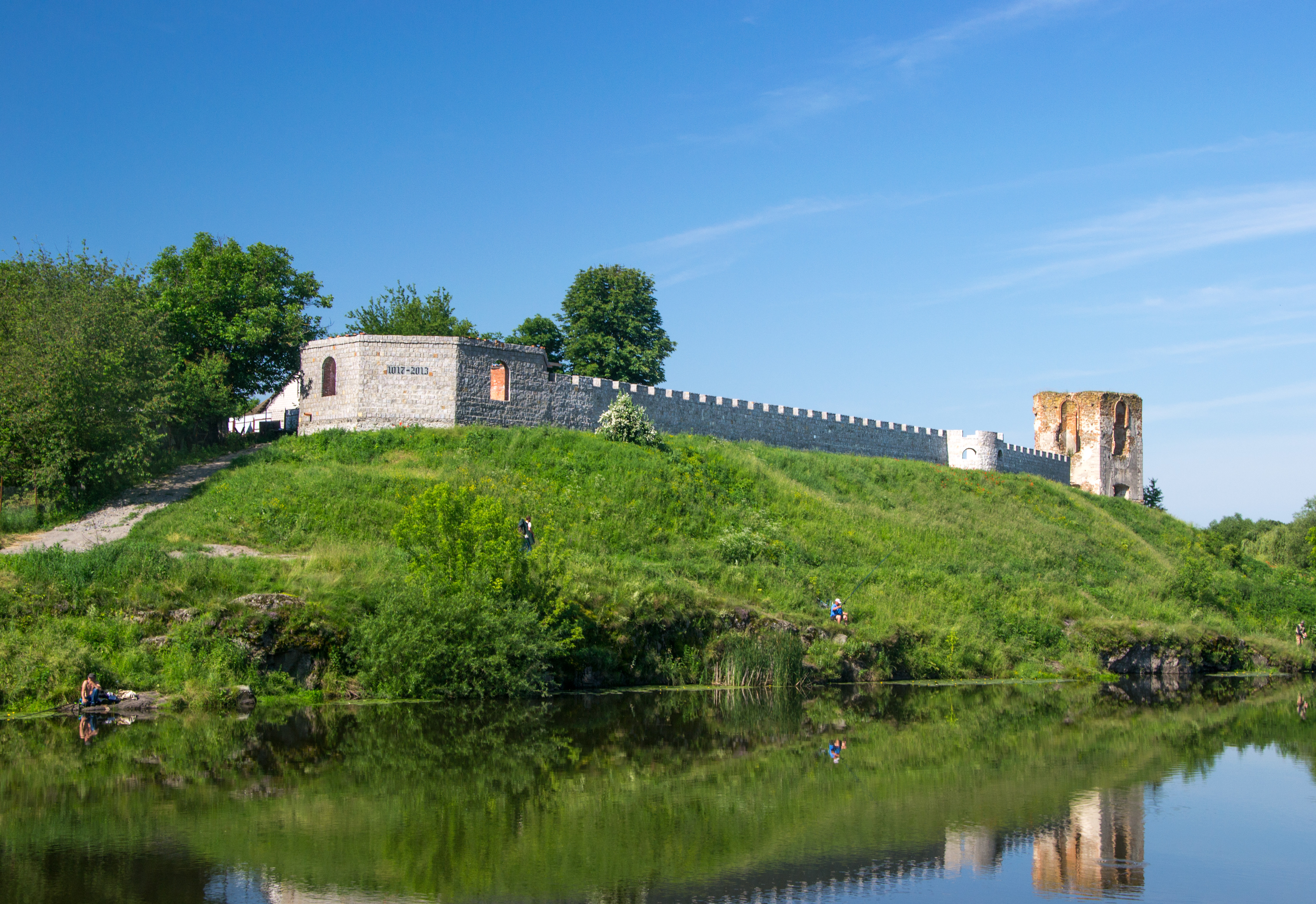 Черленківський замок (башта), Селище, вул. Кірова